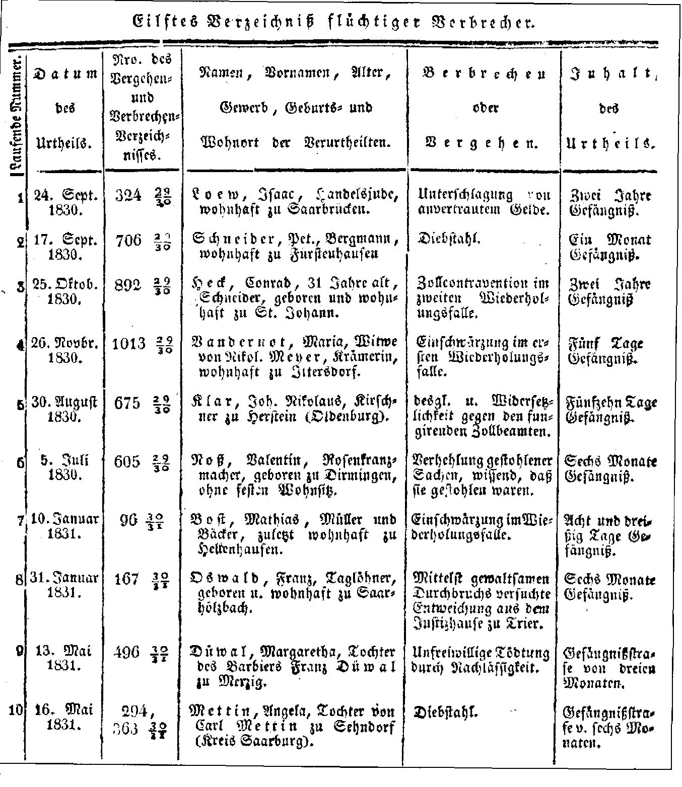 Verzeichnis flüchtiger Verbrecher aus dem Jahre 1831